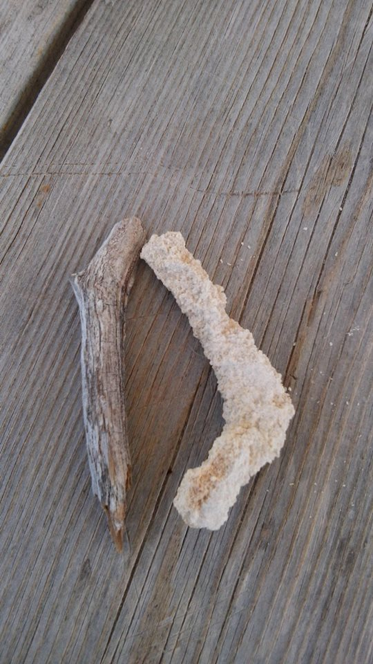 Contraste de un trozo de tronco fosilizado (derecha), junto a uno de tronco seco (izquierda).